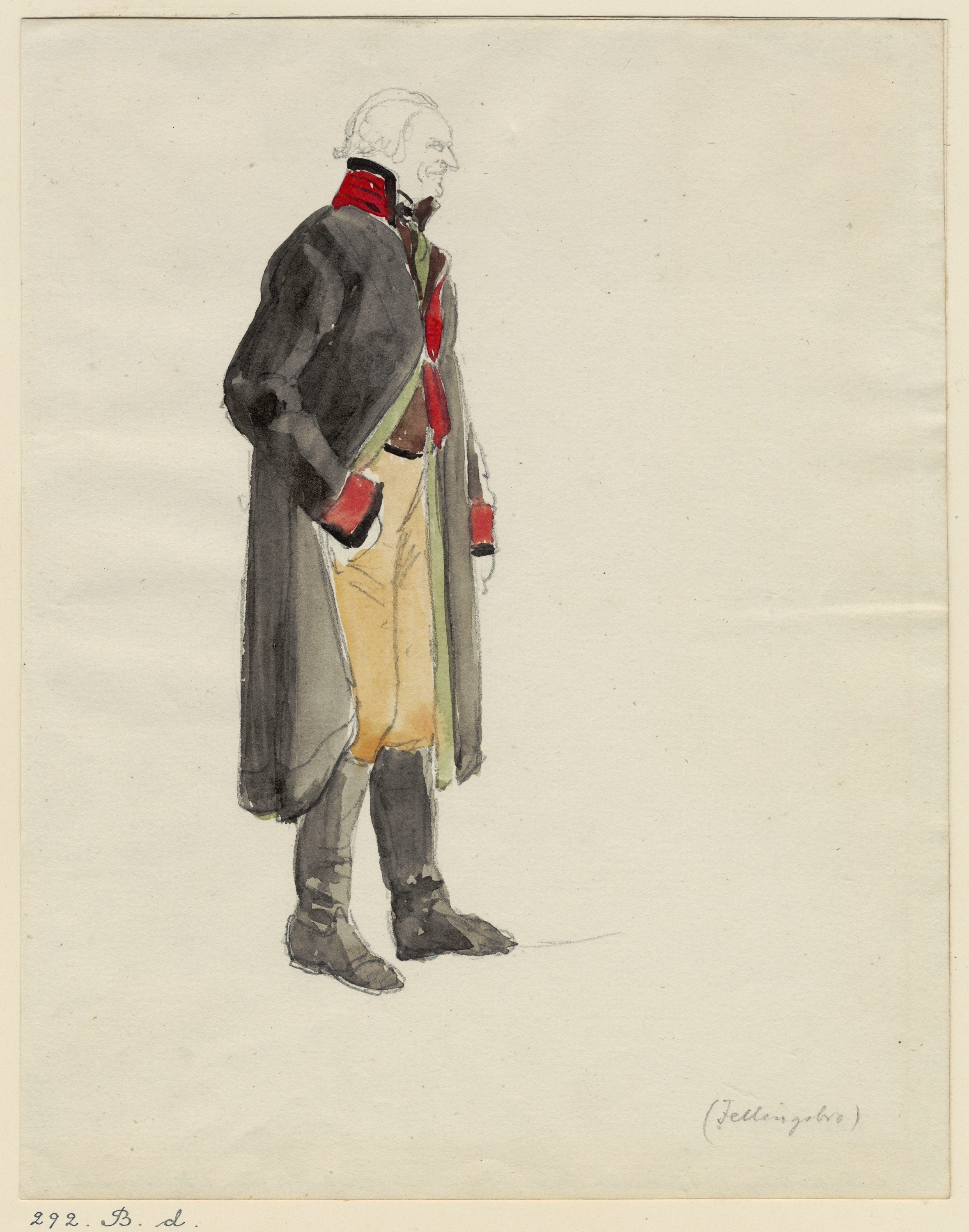 Akvarell Mansdräkt från Fellingsbro (från sidan). Västmanland. Fellingsbro sn. Akvarell av J. W. Wallander